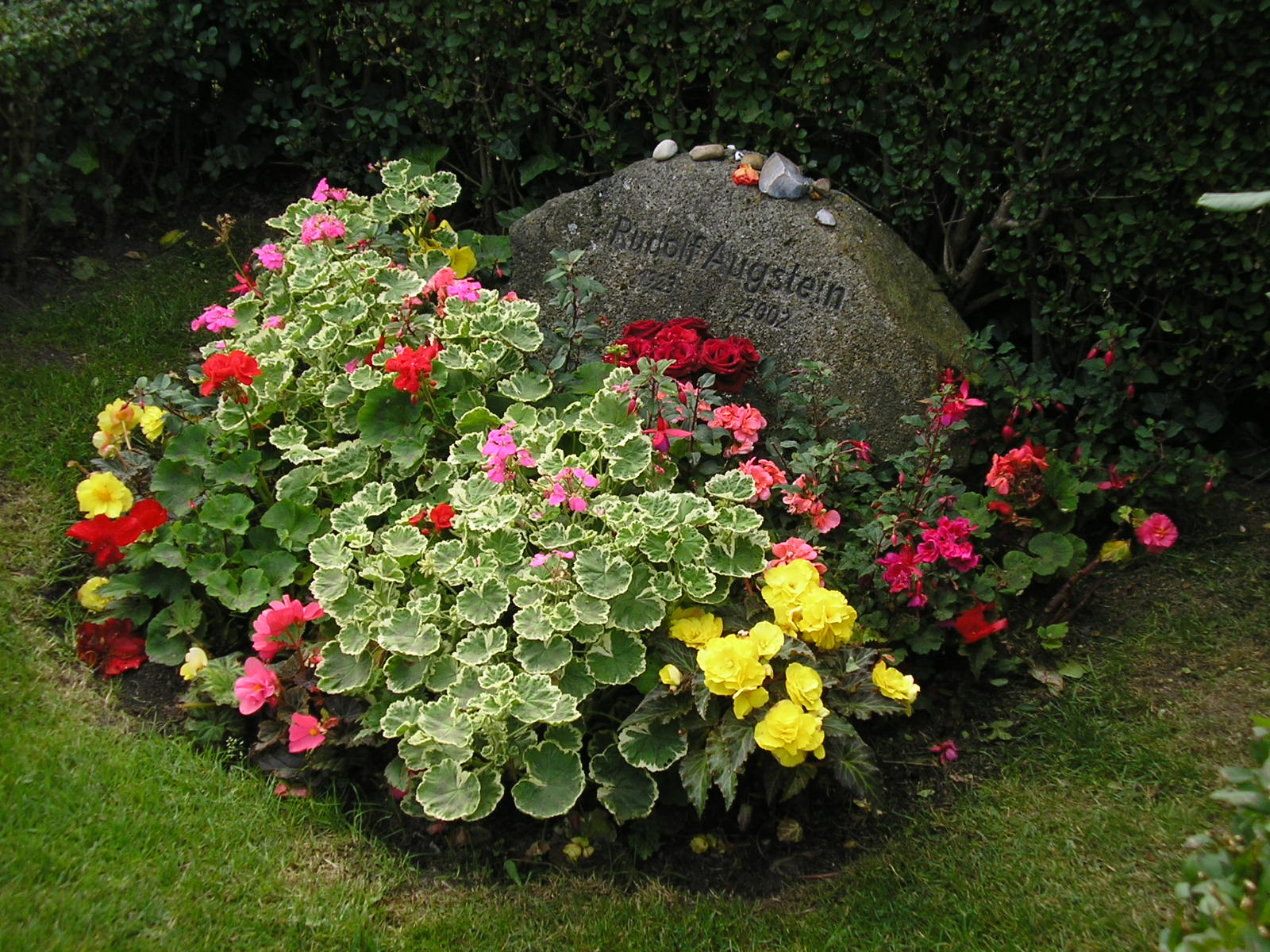 Grabstätte des Spiegel-Gründers Rudolf Augstein (Friedhof Keitum auf Sylt)